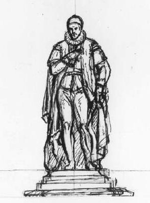 Detail van een aan Louis Royer toegeschreven tekening van het ontwerp voor diens beeld van Willem van Oranje in Den Haag.